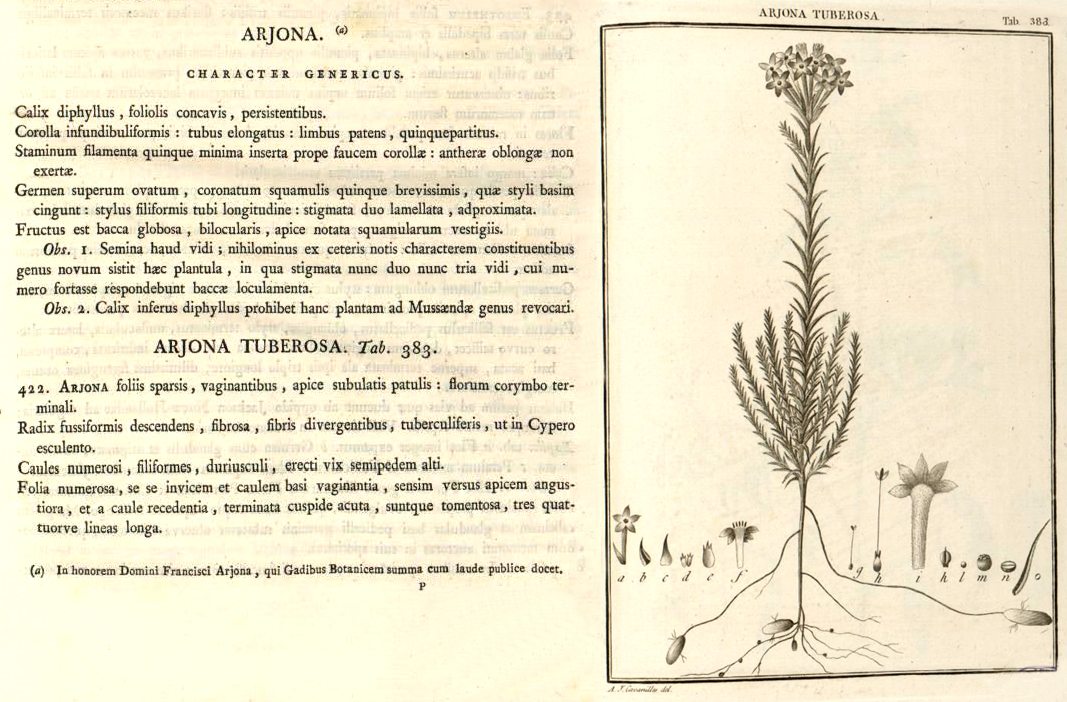 Protólogo de Arjona tuberosa Cav. se incluye diagnósis original e ilustración.